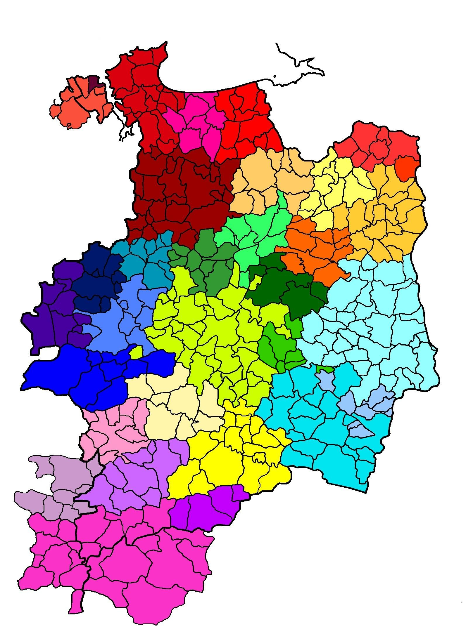 Intercommunalités-d'ille-et-vilaine 01-01-2012